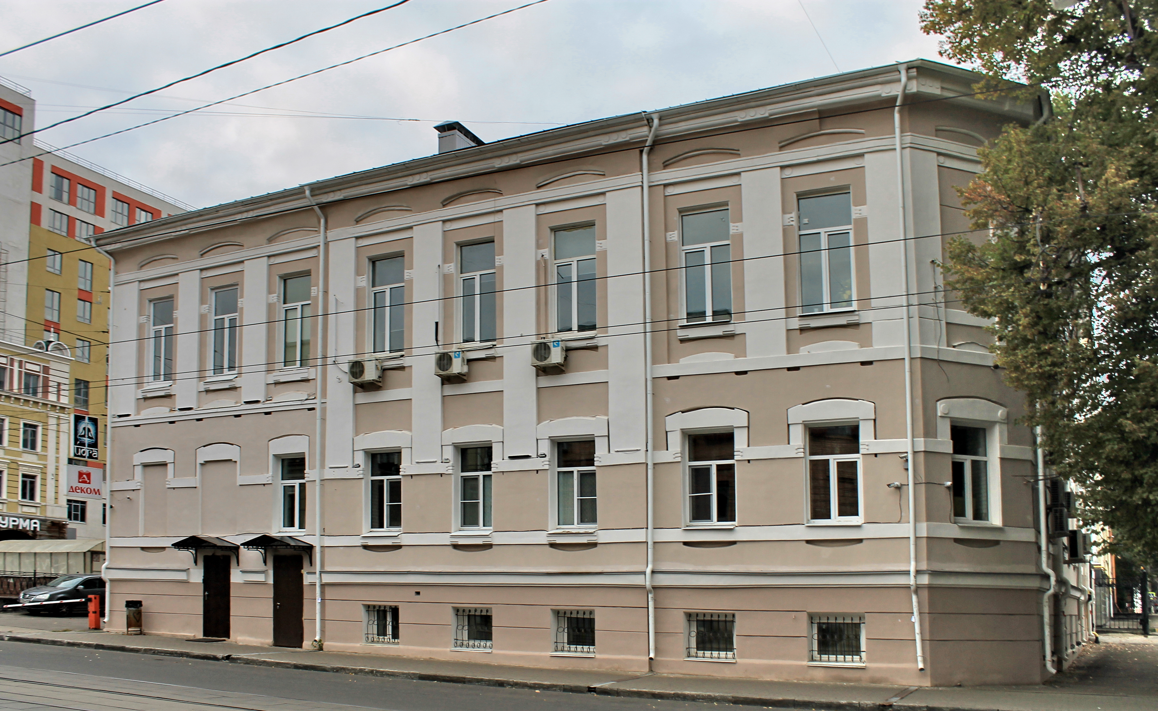 Комплекс зданий Нижегородской уездной земской управы: Большая Печерская улица, 28, Нижний Новгород, Нижегородская область